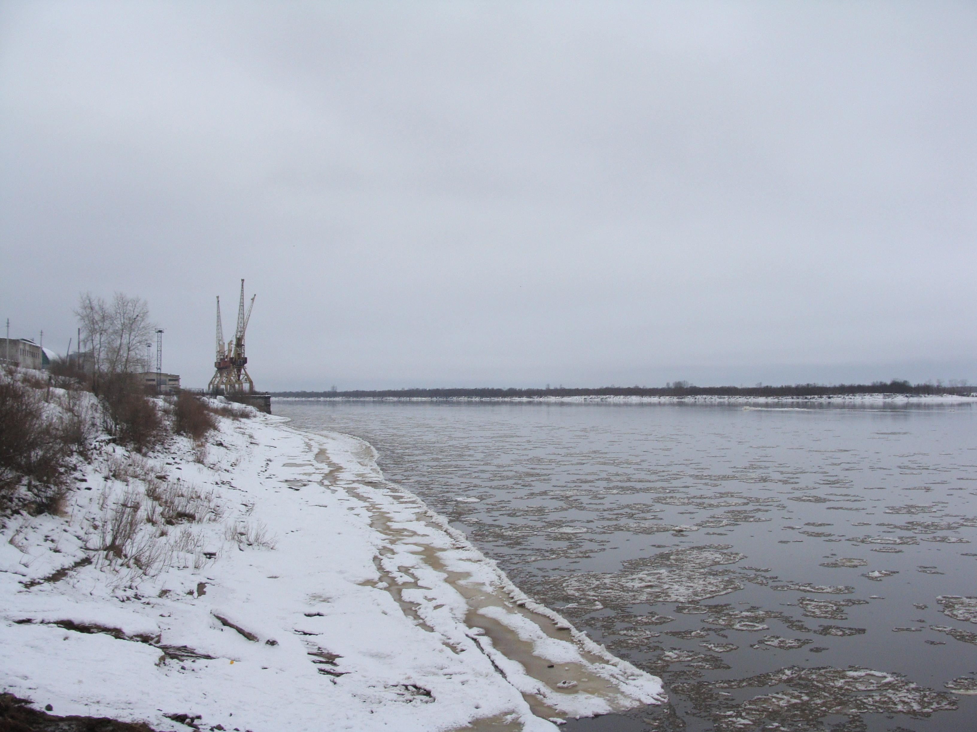 Северная Двина у Котласа в ноябре